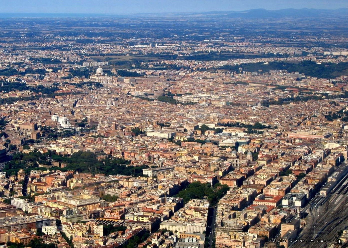 Luftbild Rom mit Blick zum Tyrrhennischen Meer und zu den Tolfabergen